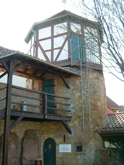 Burg-Gräfenrode, part of Karben in Hesse, Germany, Lieselturm